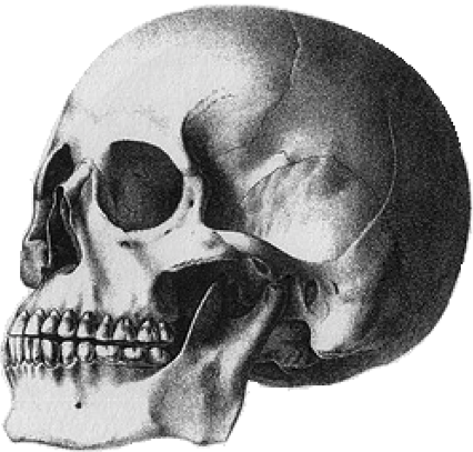 これはネイティブアメリカンの頭骨である。 頭骨はパタゴニアのプェルチェ(Puelche マプチェ族の小群)族の人々からある。 それはサミュエル・ジョージ・モートン(Samuel George Morton)によってなされた。